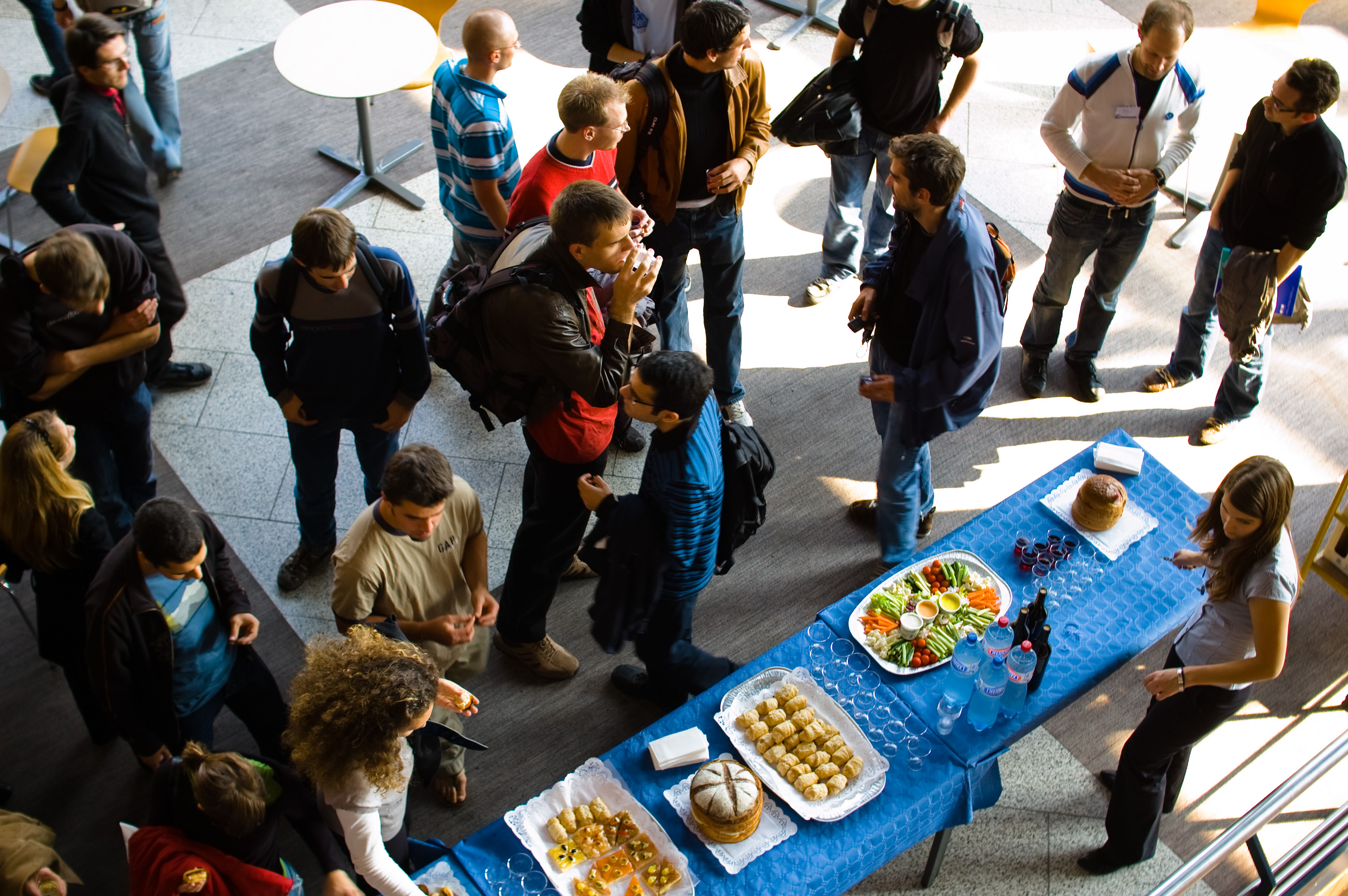 Une des présentations les plus attendues aujourd'hui au forum: celle de Nokia, qui vient d'ouvrir un centre de recherche - sur les "pervasive communications" - à l'EPFL. La salle était pleine à craquer.